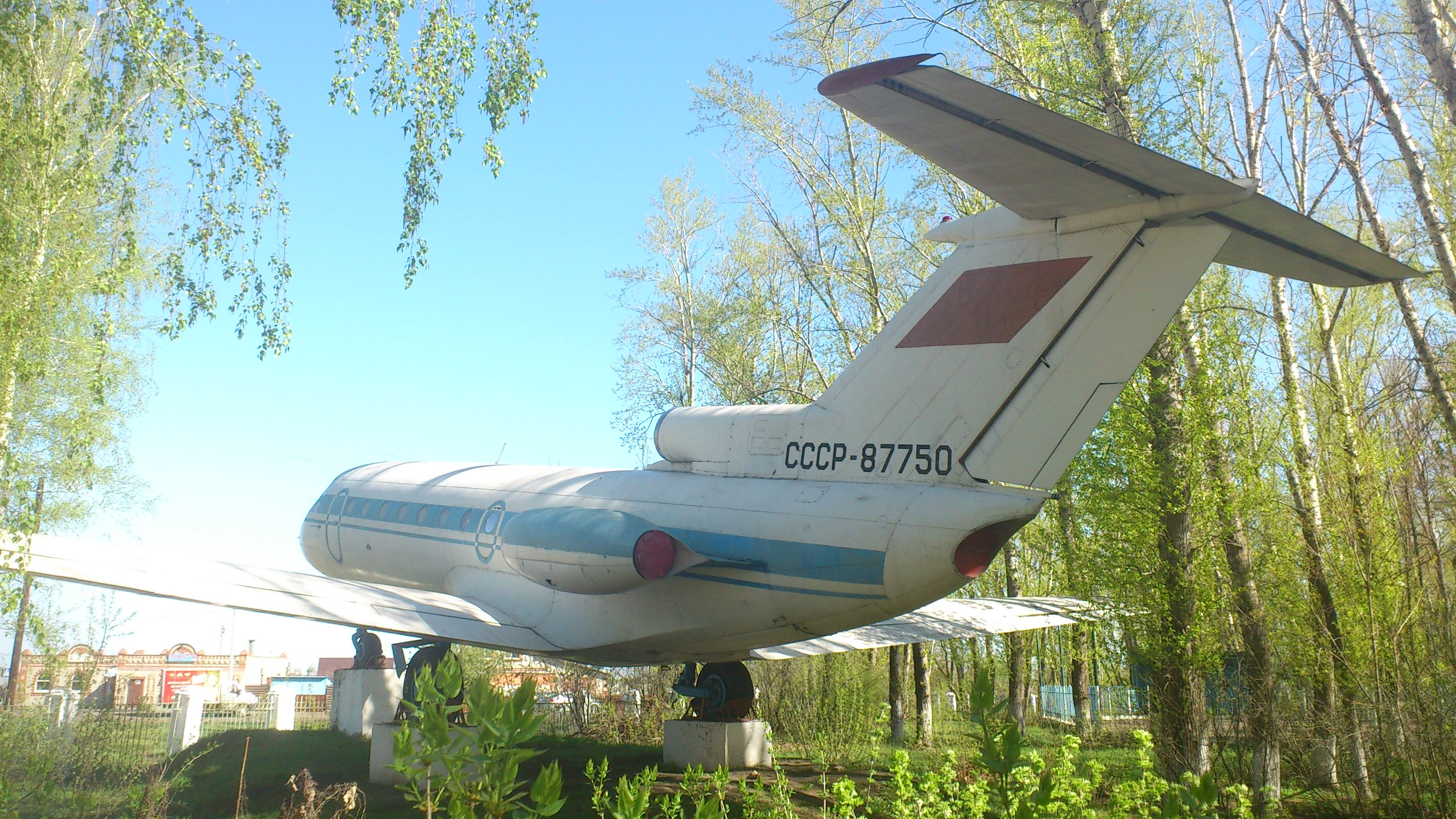 Самолёт Як-40 СССР-87750, установленный перед Кирсановским авиационно-техническим колледжем (КАТК ГА). Вид сзади.